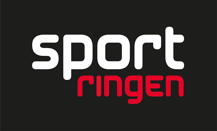 Sportringens logotype